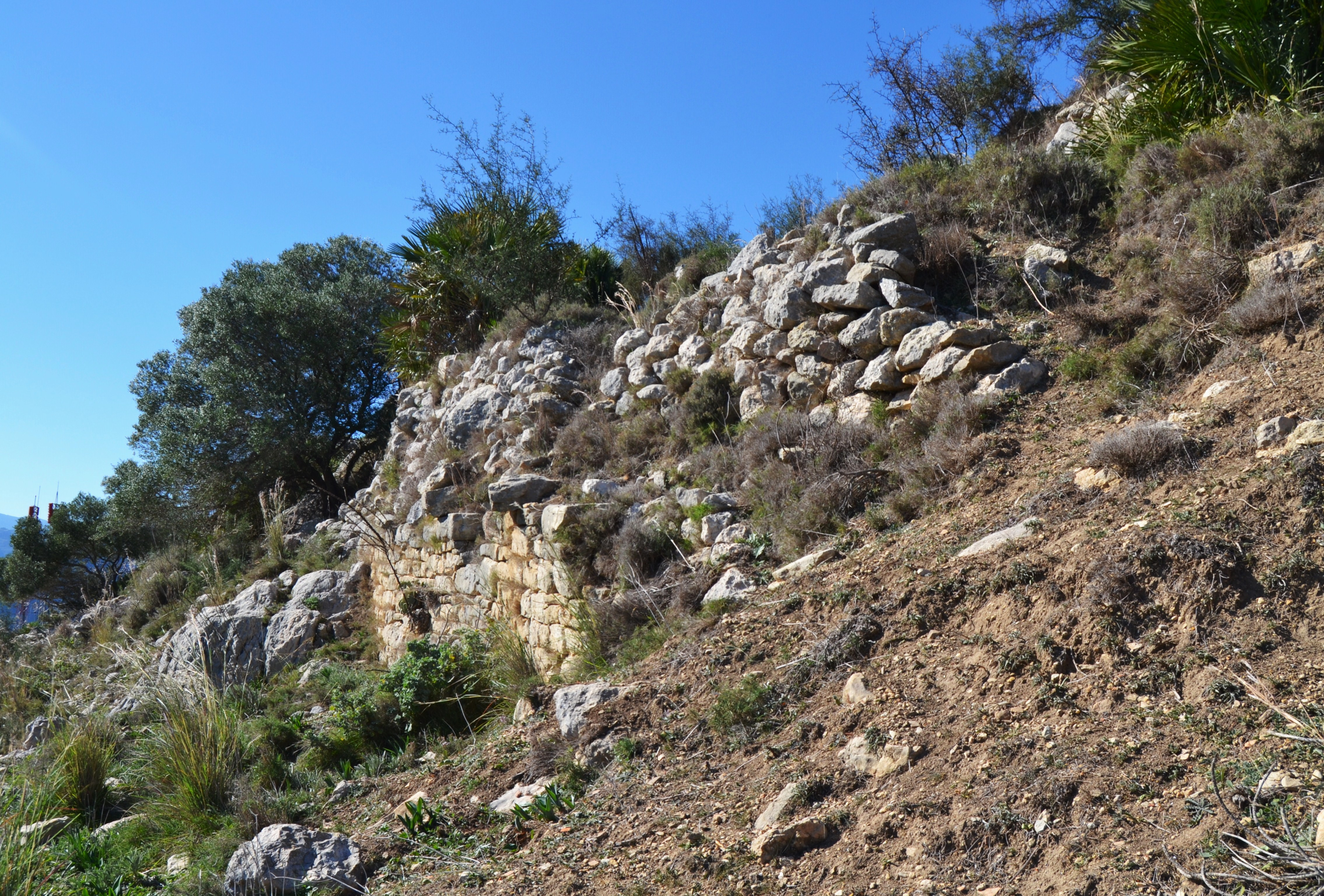 Poblat ibèric de Segària, muralles.